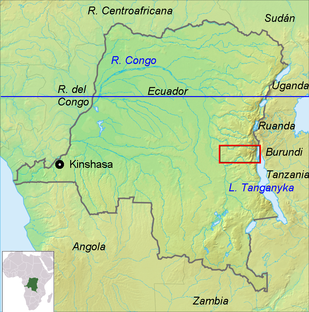 Mapa de R.D. Congo. Indicación de principales lugares y lugar de actuación de la guerrilla en 1965 cuando el Che Guevara actuó allí